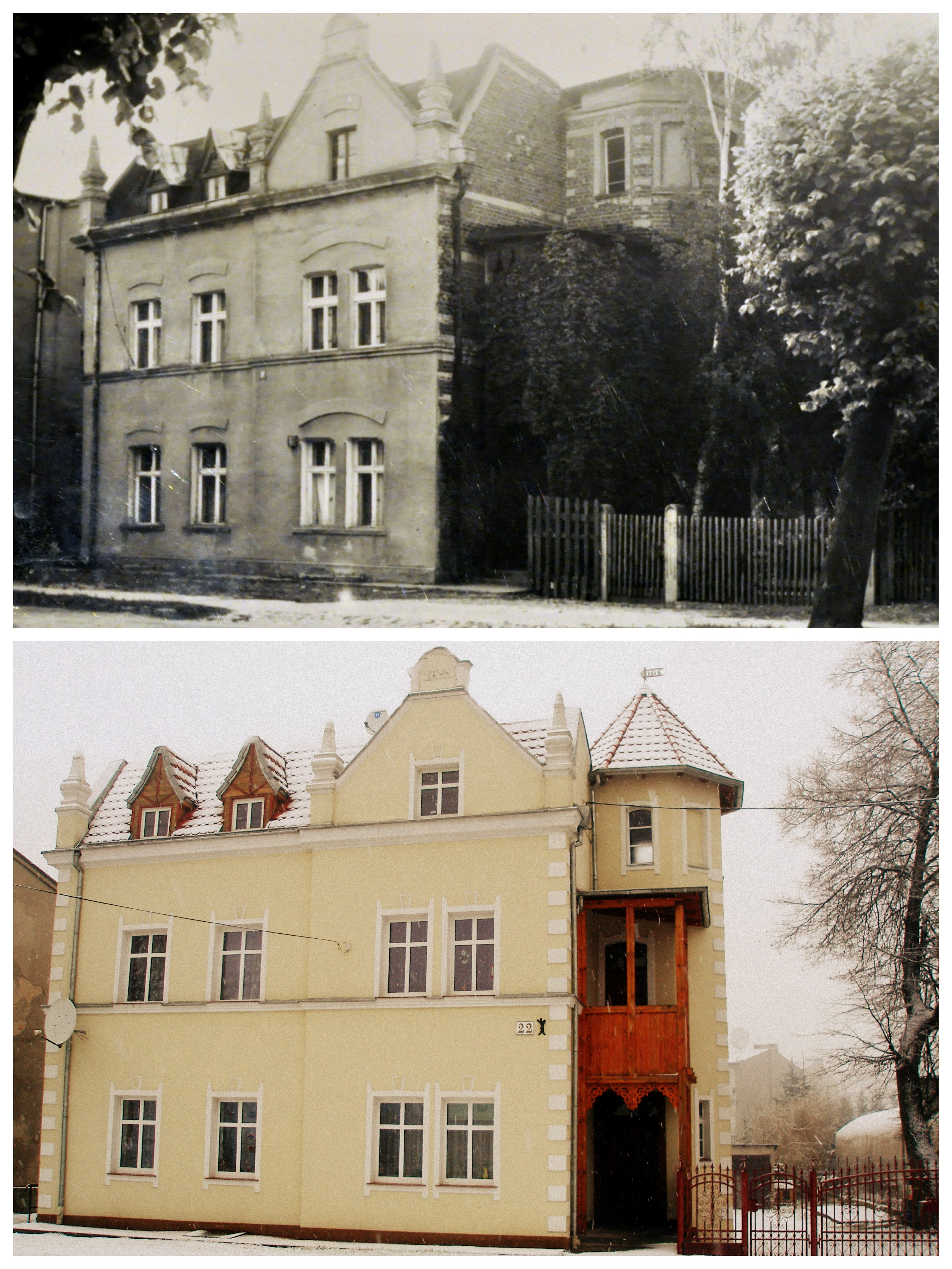 Nineteenth-century townhouse on the Grudziądzka street in Biskupiec. At the top in 1974, at the bottom - now restored.